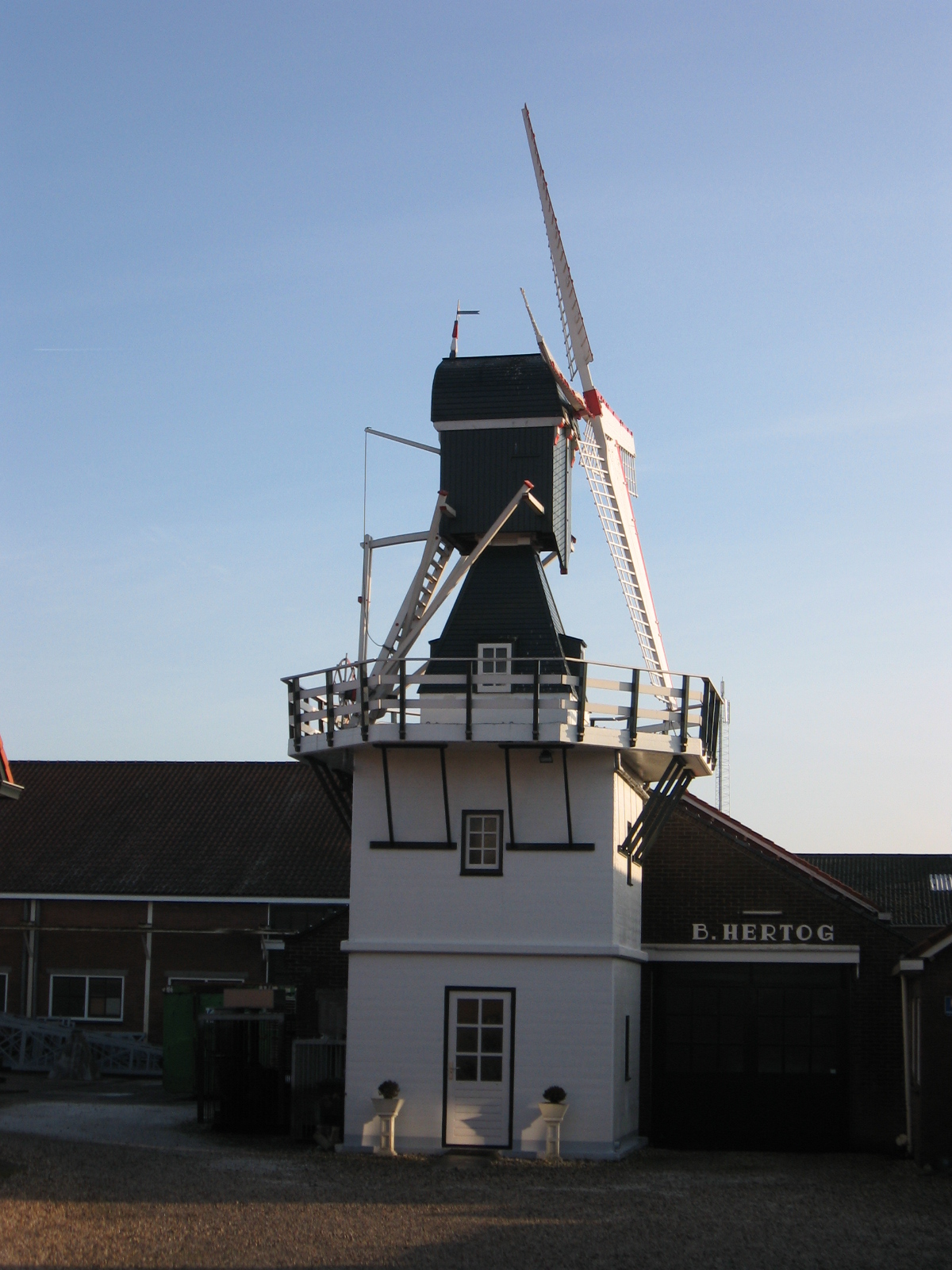 wipmolen Moerkapelle